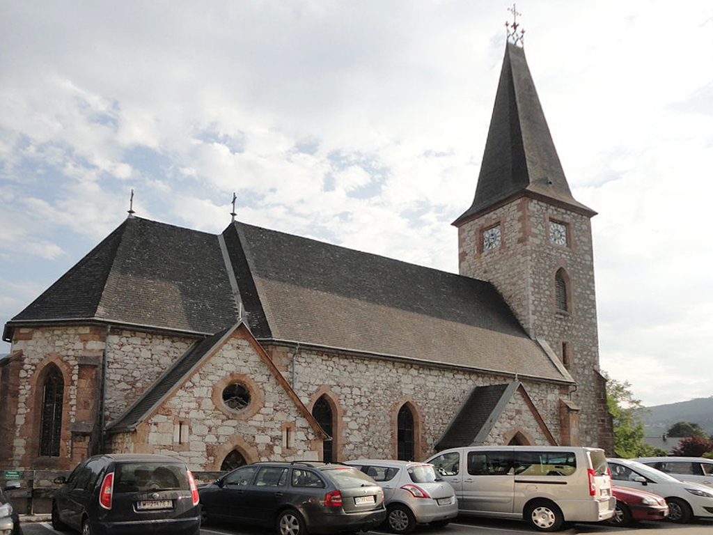 Kath. Pfarrkirche hl. Ägyd mit ehem. Friedhof (heute Parkplatz)